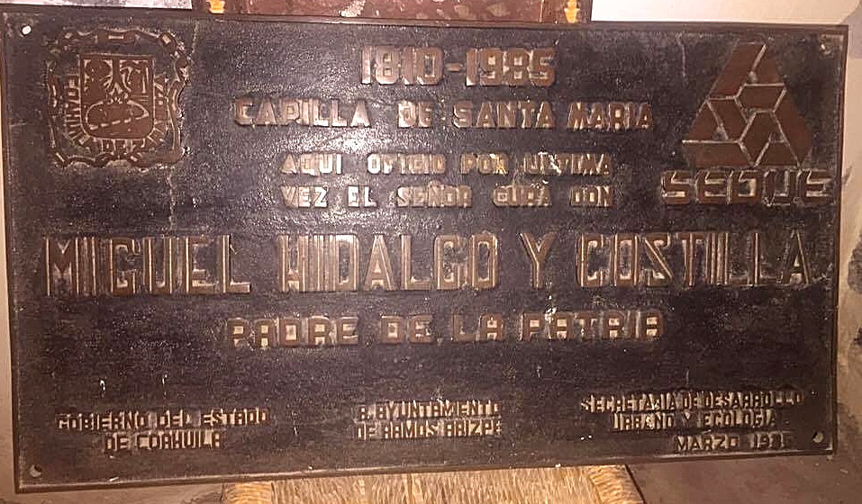 Esta placa describe que el padre de la patria mexicana, Miguel Hidalgo y Costilla, ofició misa por última vez en la capilla